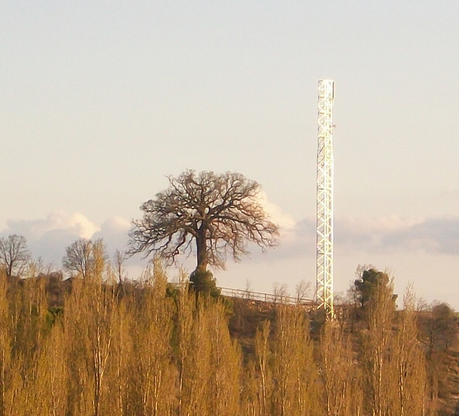 La antena y el mirador